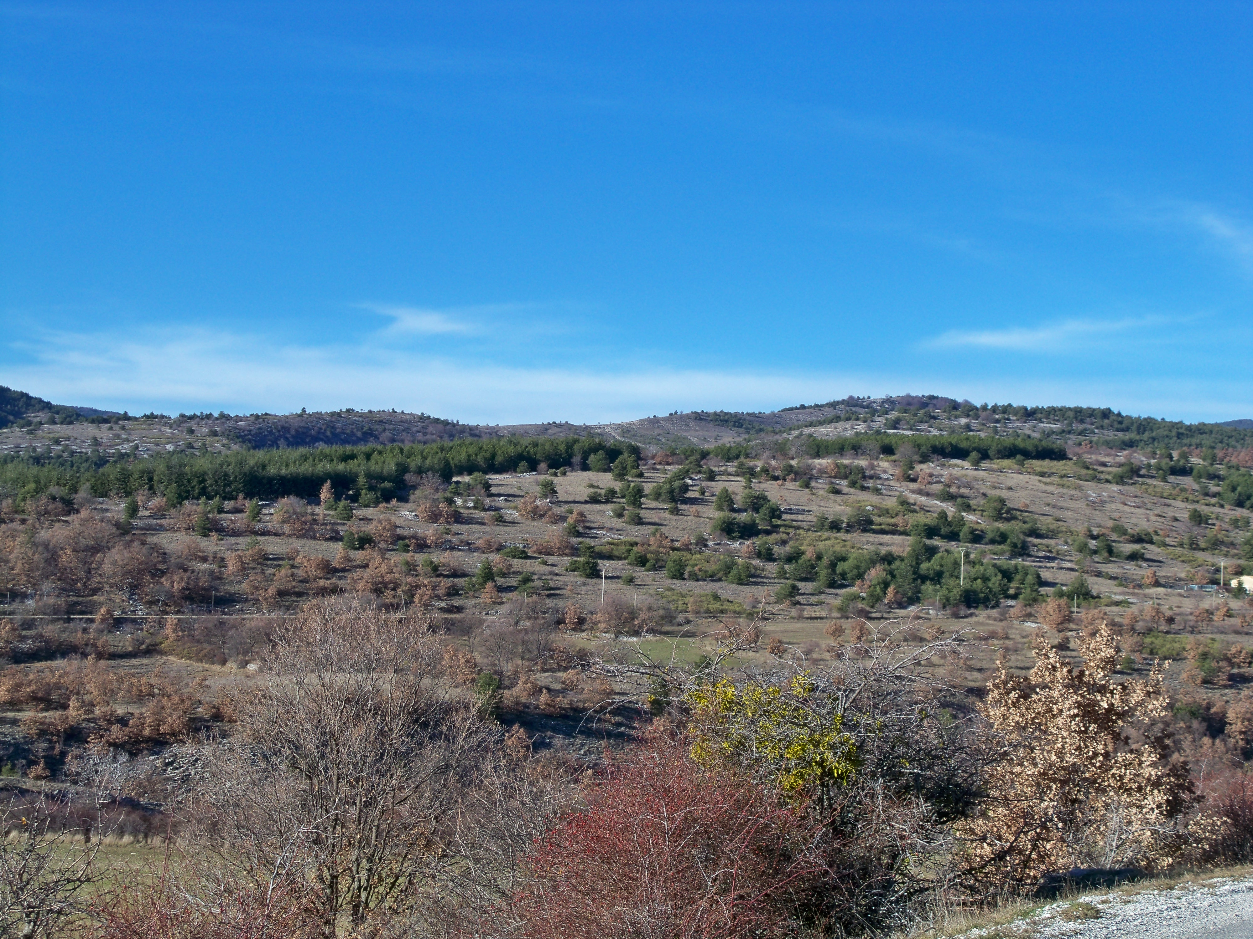 Paysage autour de L'Hospitalet (04), France